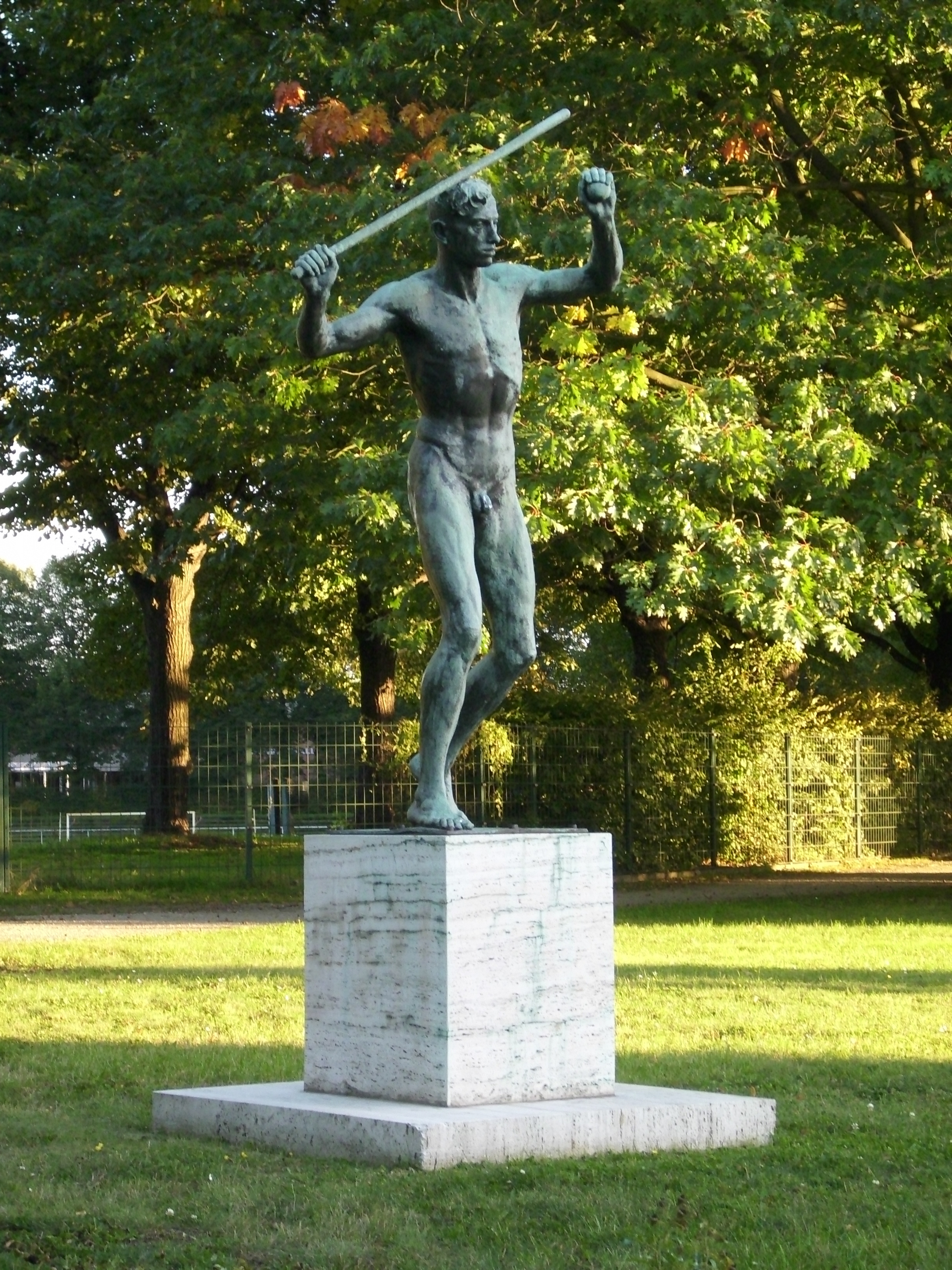 Freiplastik "Schlagballspieler" Forst Lausitz, Spremberger Straße